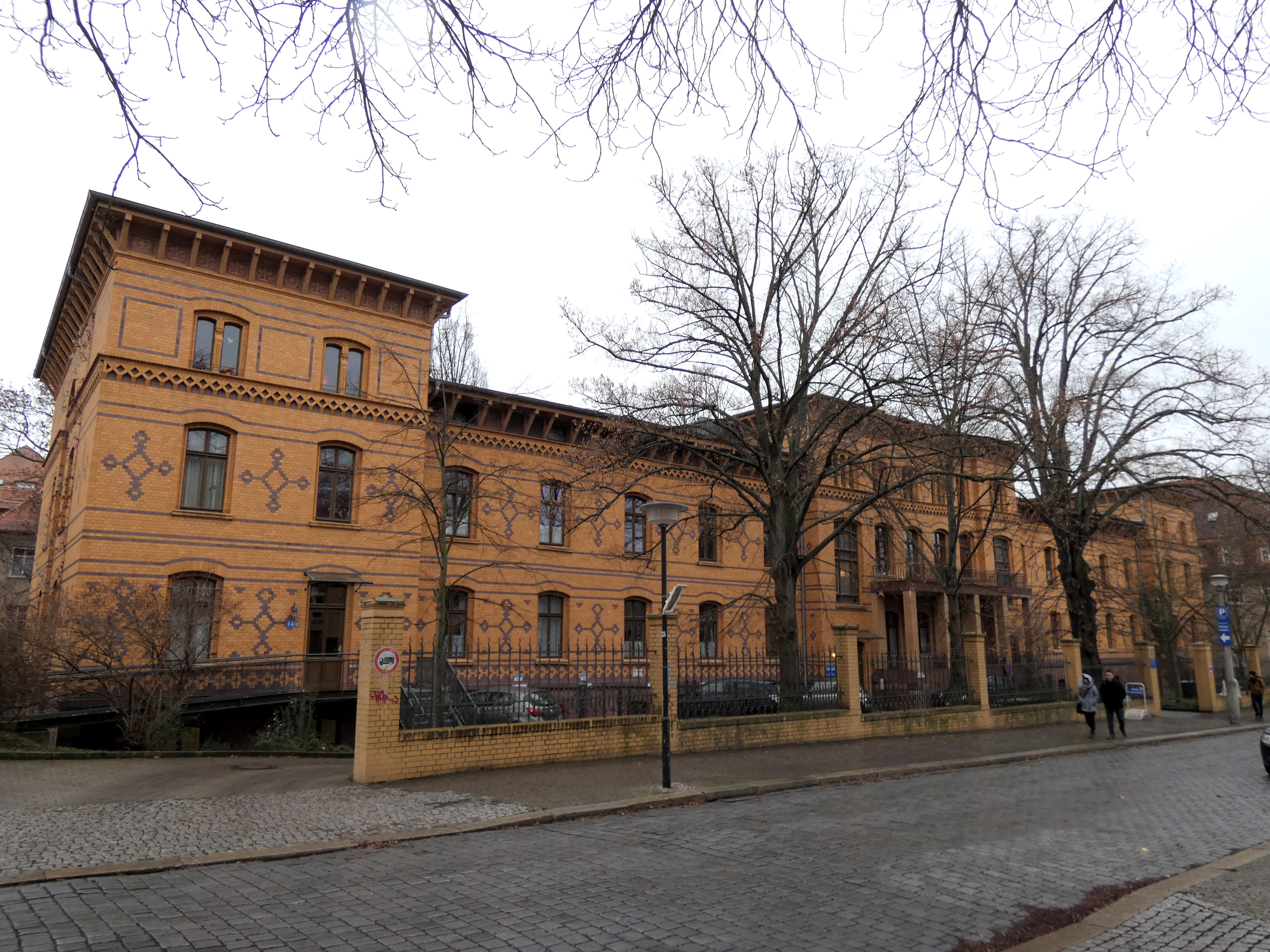 Lafontainestraße 14, Martinstift, Diakoniewerk Halle, Halle (Saale)